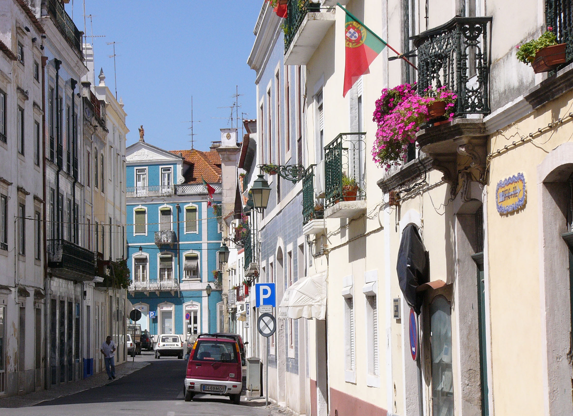 Street in Santarém, Portugal